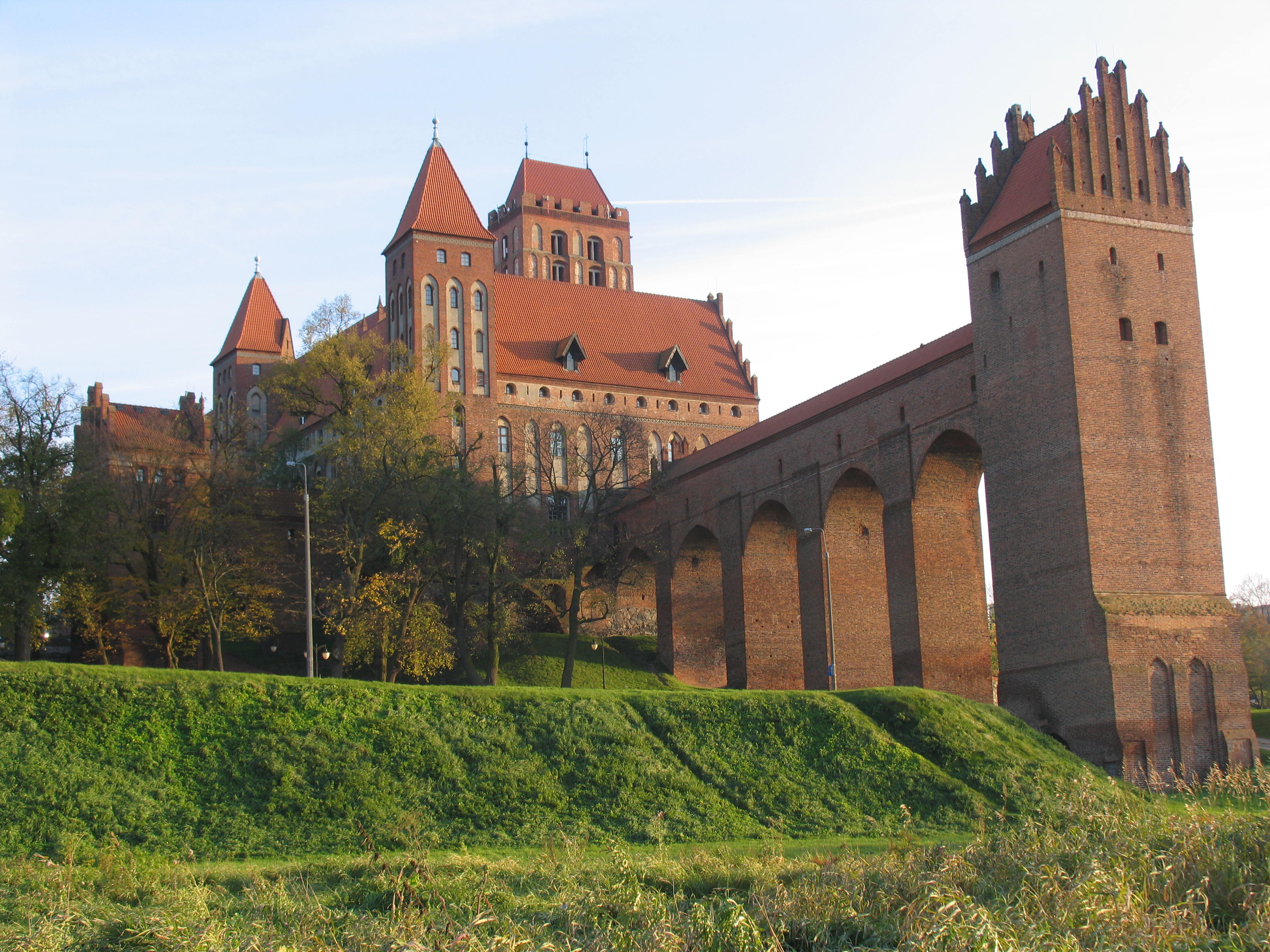 Kwidzyn, Zamek Kapituły Pomezańskiej, ob. muzeum, ok. 1322-XIX